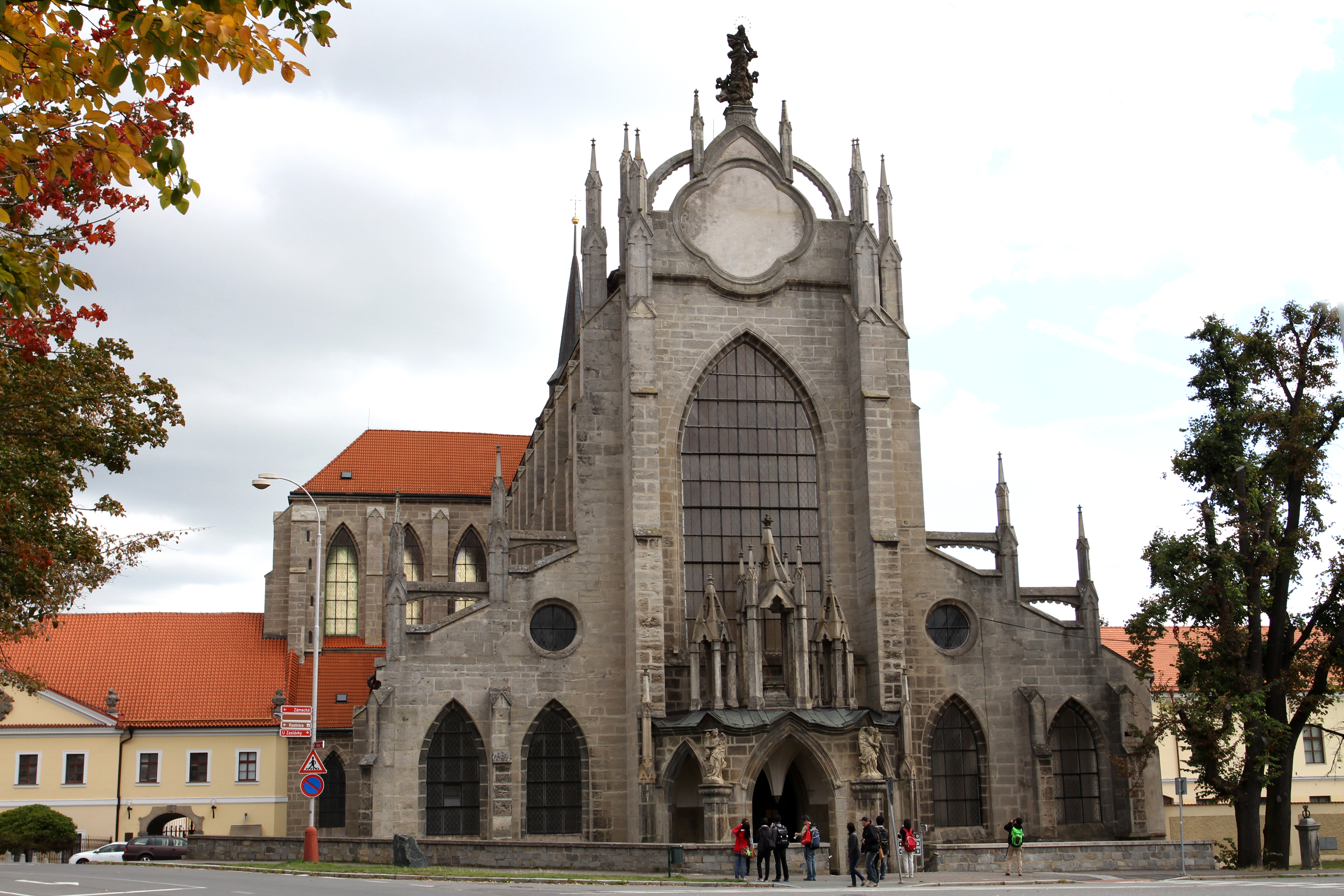 Klášter cisterciácký, s omezením: bez budovy jídelny (Sedlec), Sedlec 1